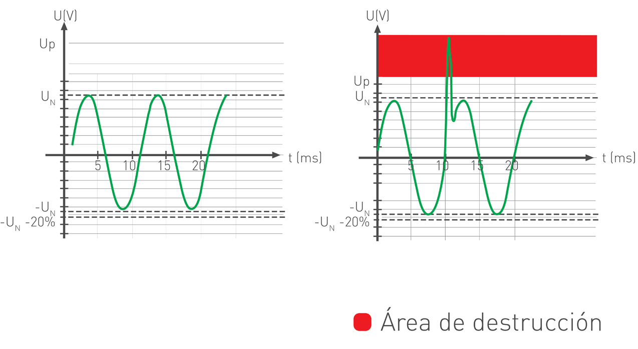 Grafica de sobretensiones permanentes